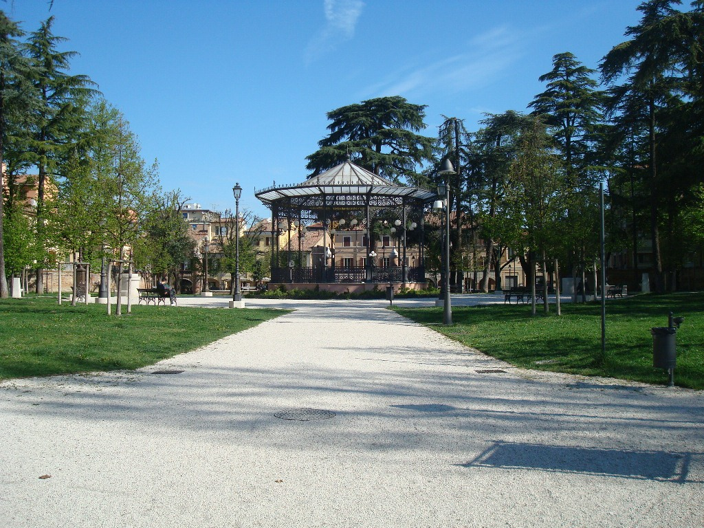 Cesena (Italie) - jardin public "Paolo Neri", ensemble du parc